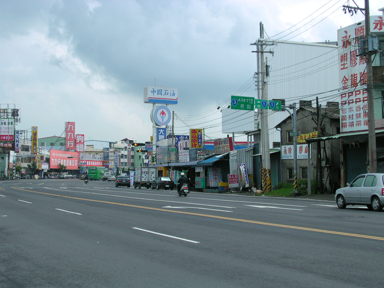 臺灣省屏東縣屏東市的省道臺3線終點。